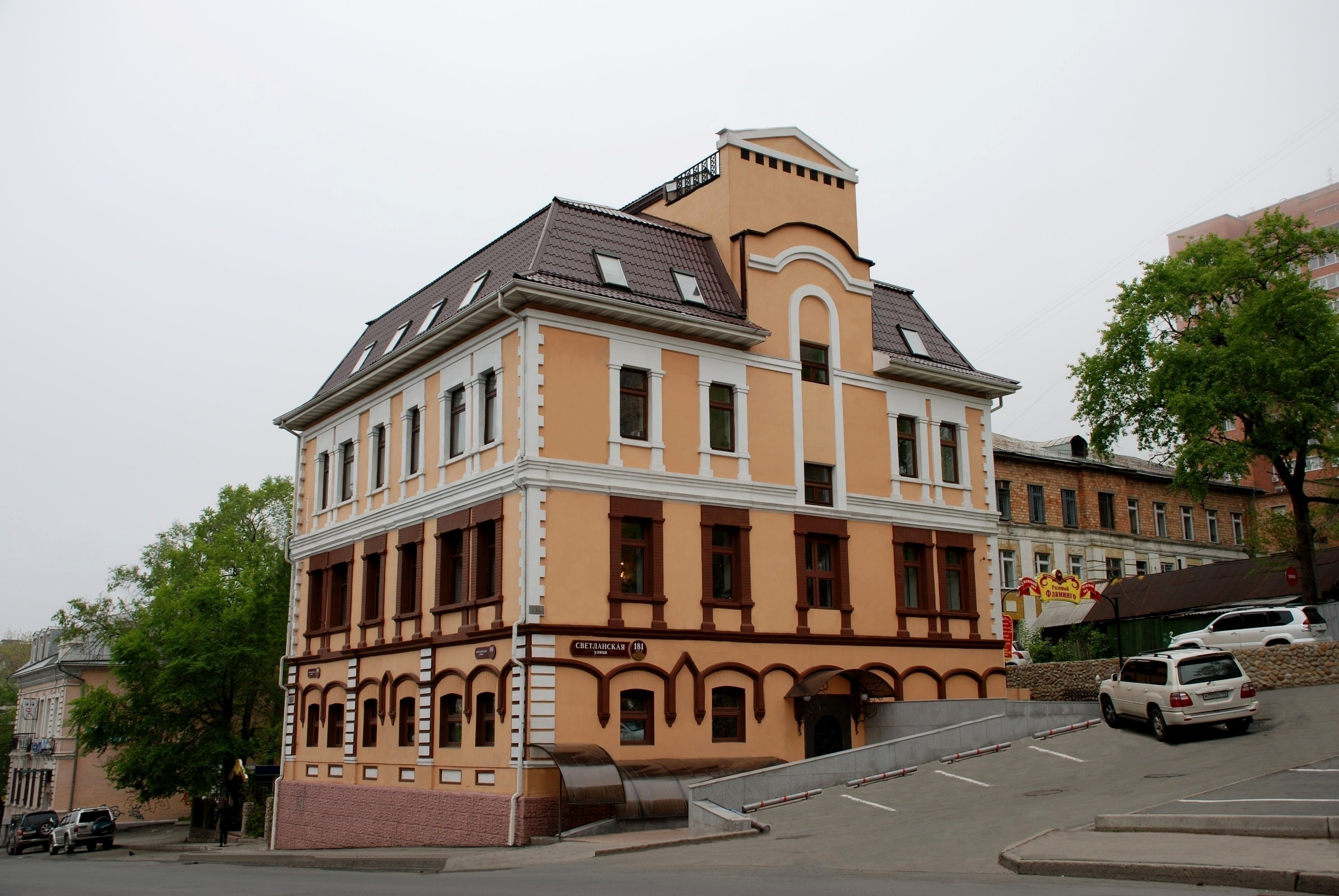 Светланская, 181